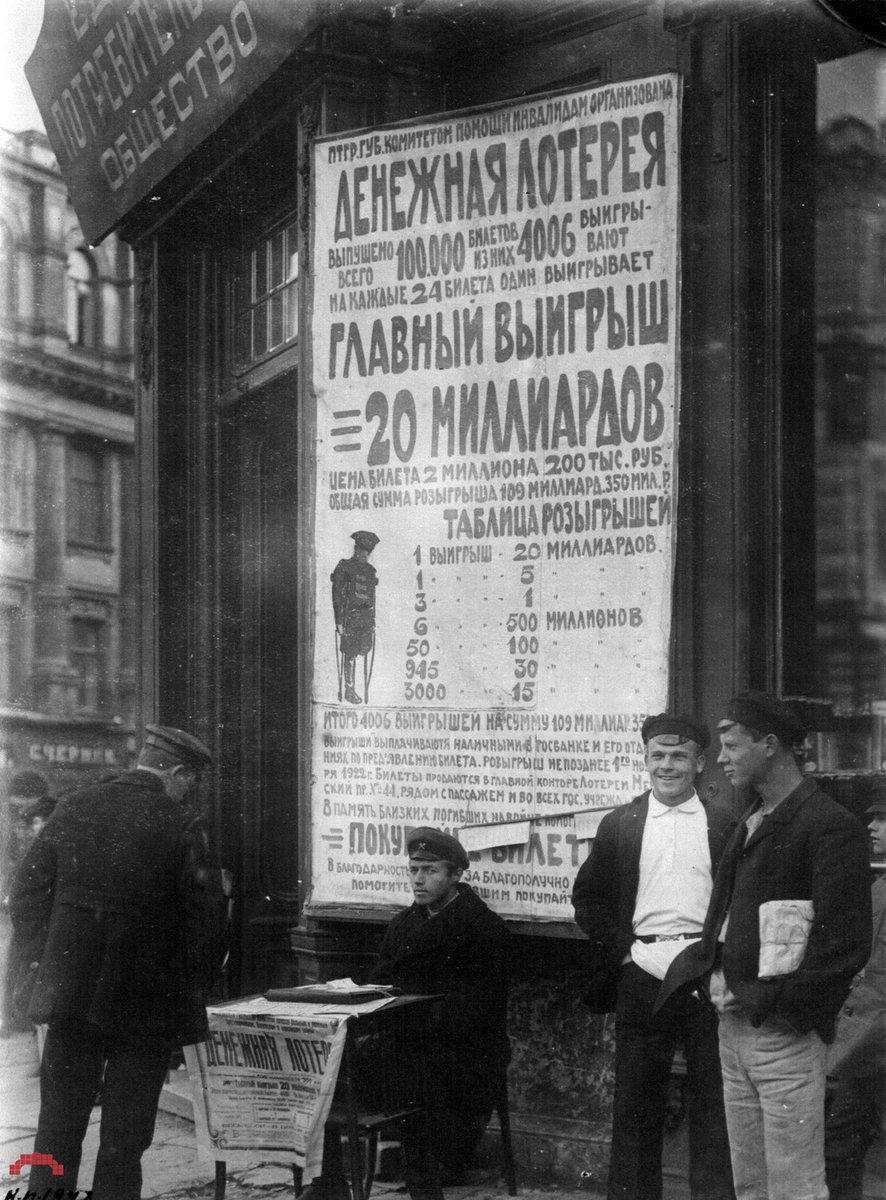 Продажа студентами-рабфаковцами лотерейных билетов в помощь инвалидам на праздновании 25 Октября. Петроград